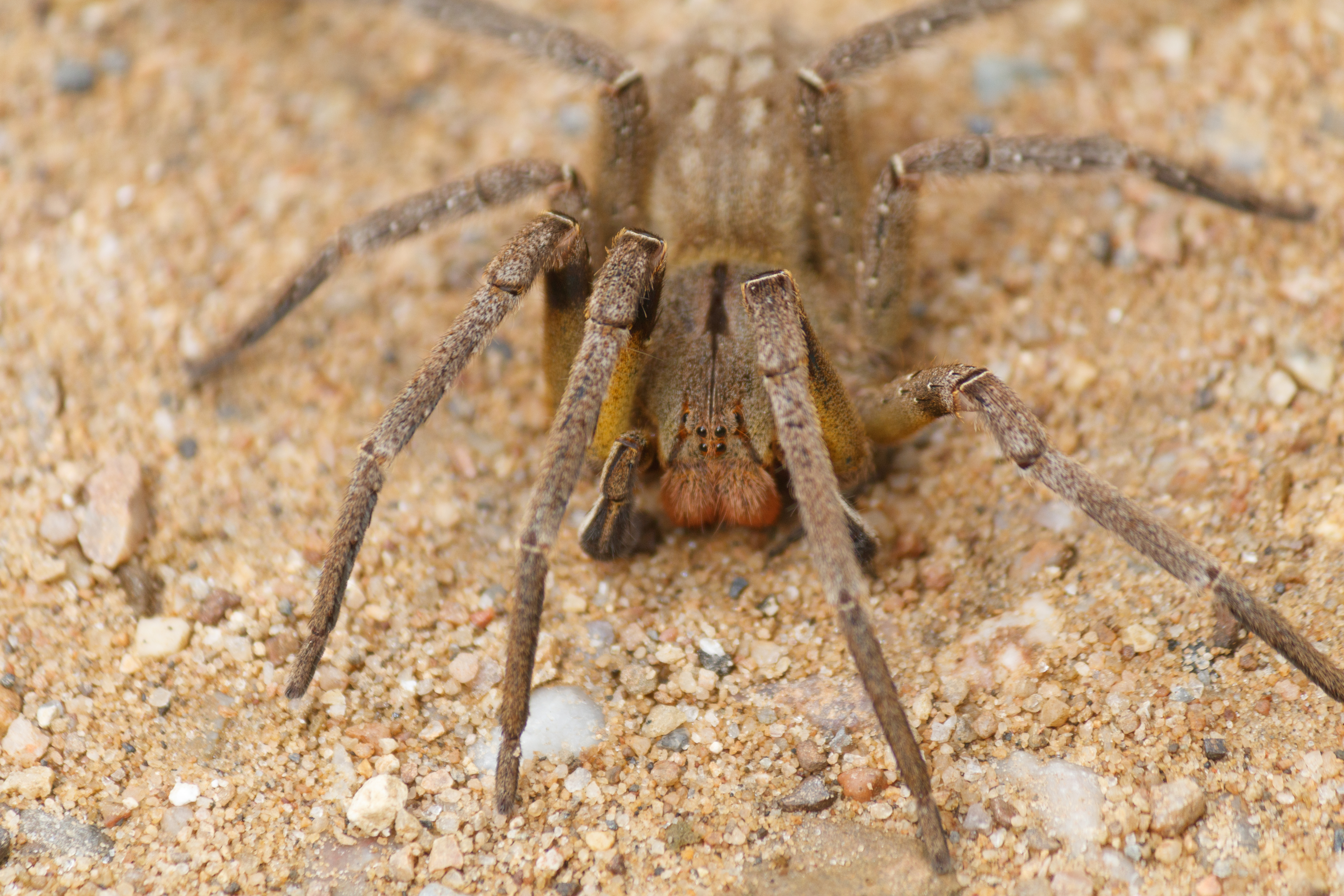 Núcleo Santana por Rodrigo Tetsuo Argenton feitas na expedição PETAR fevereiro 2020